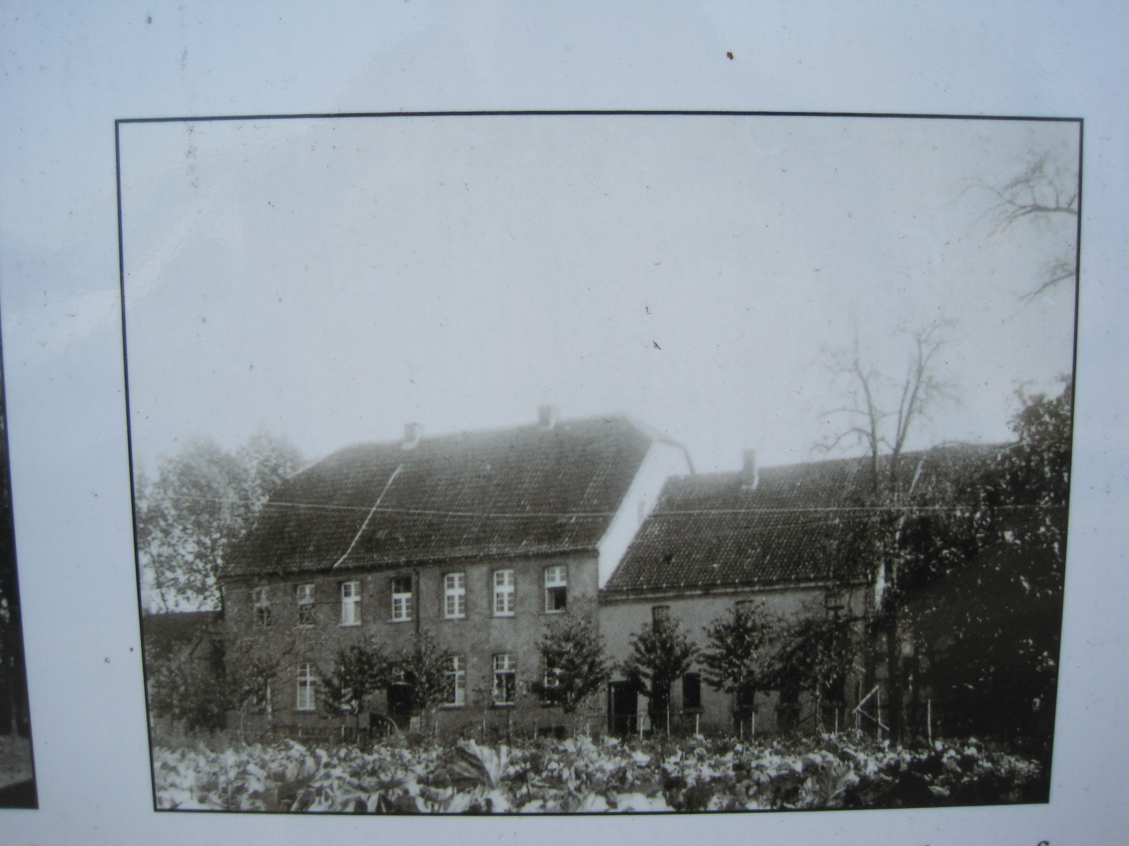 Das Foto zeigt einen Auszug aus einer Informationstafel auf dem Burghügel Mark zu Hamm.